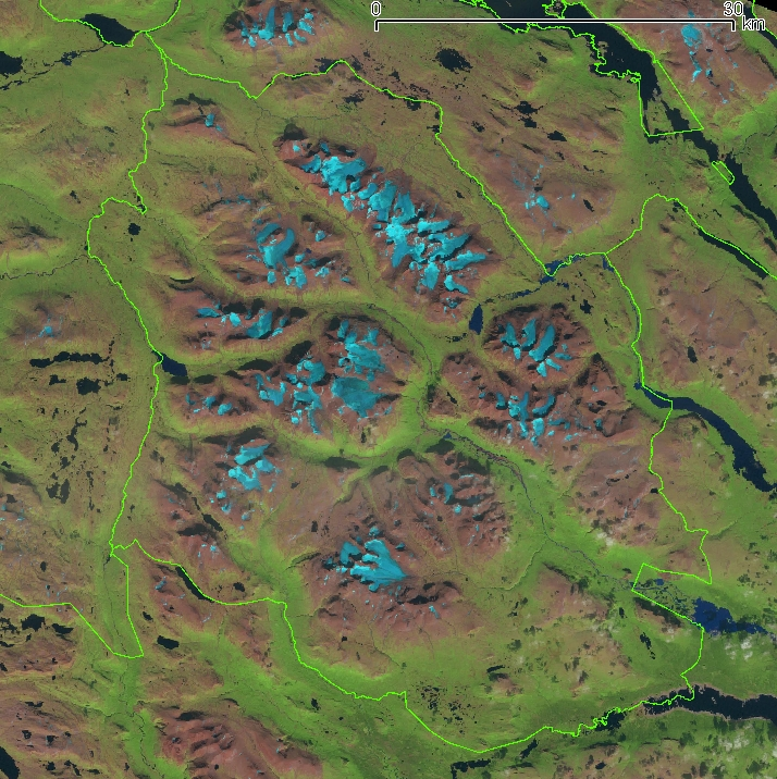 Photo satellite découpée Landsat 4-5 TM du 19 août 2006 : les glaciers du parc national de Sarek sont nettement visibles.